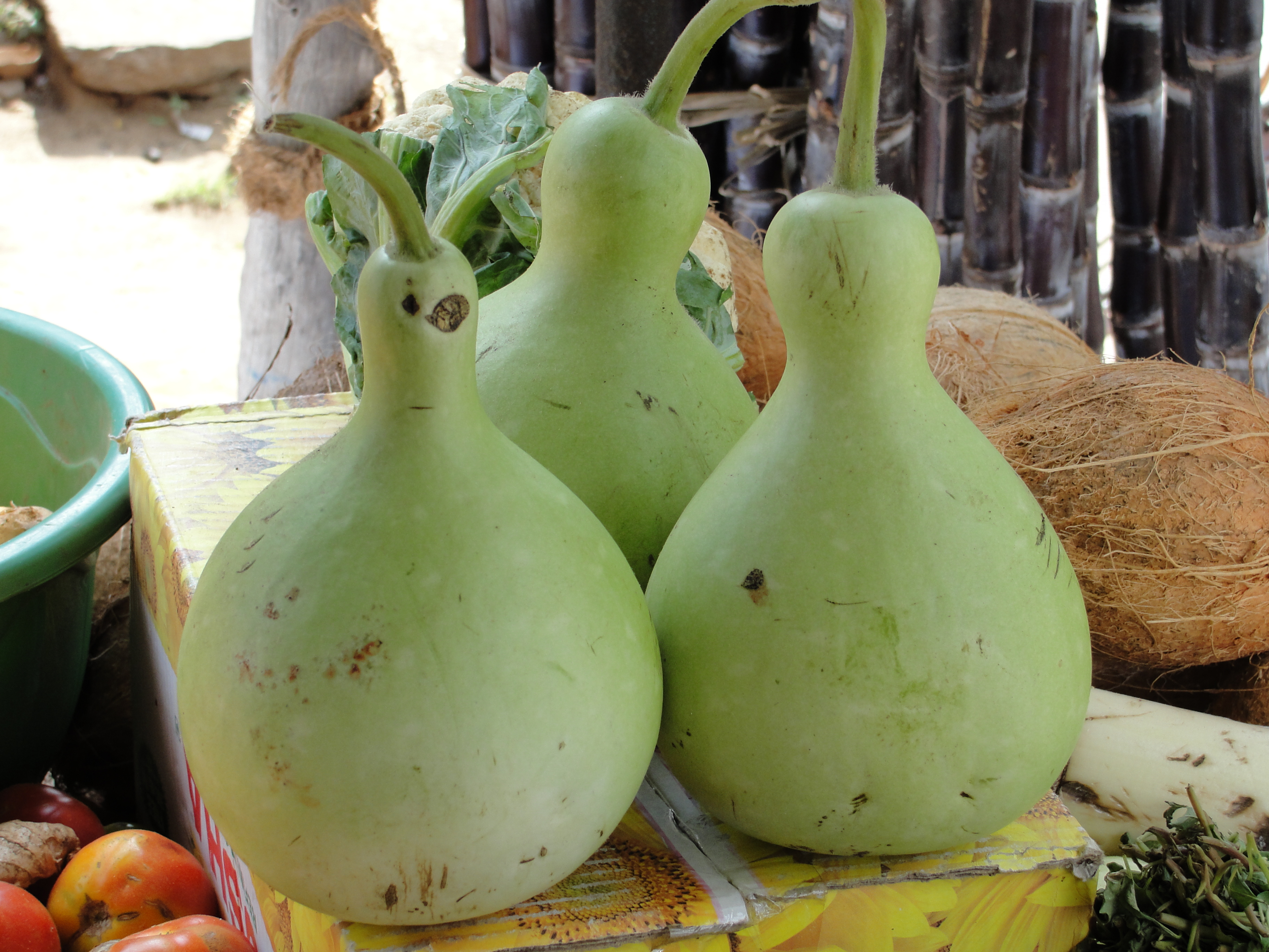 சுரைக்காய்Unknown bottle gourd